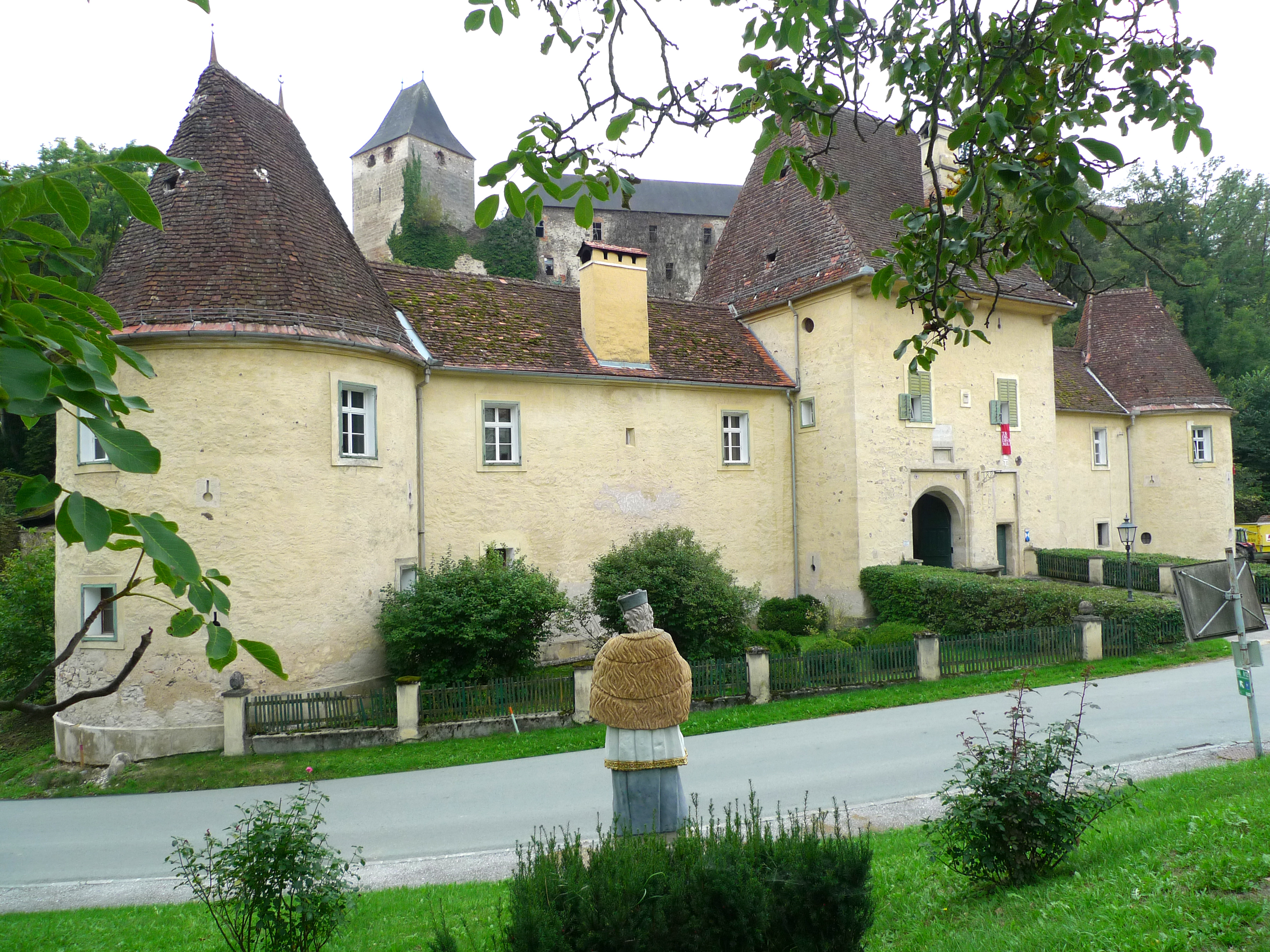 Burg Thalberg